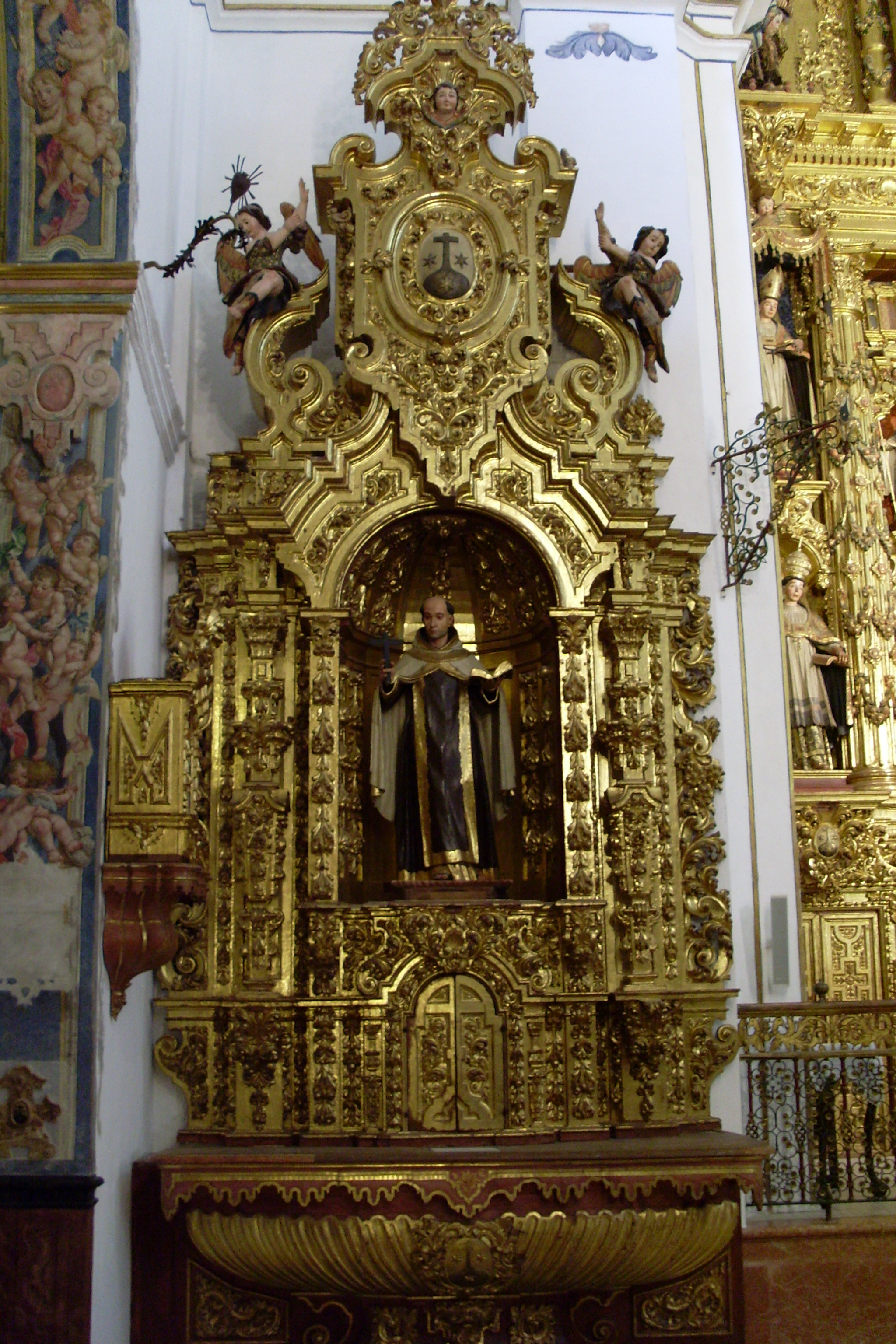 Altar de San Juan de la Cruz de la Iglesia de los Descalzos de Écija